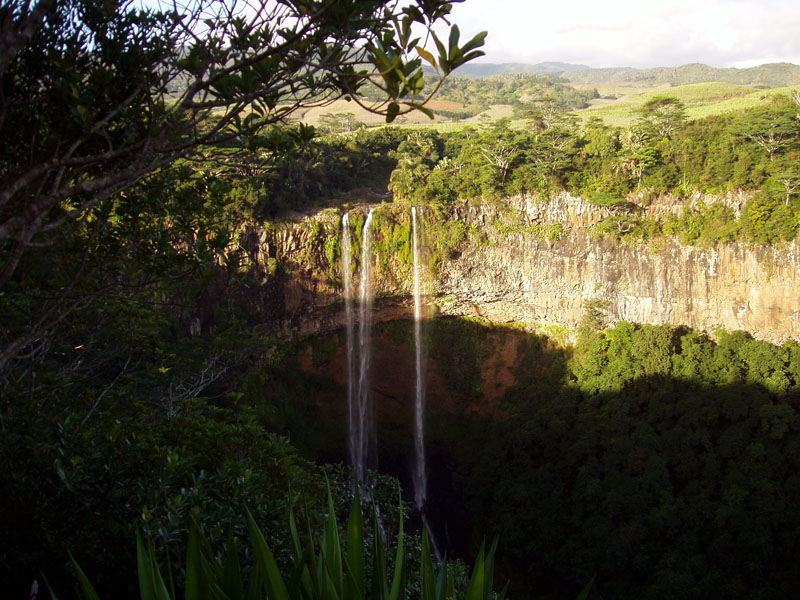 Chamarel-Wasserfall im Südwesten von Mauritius